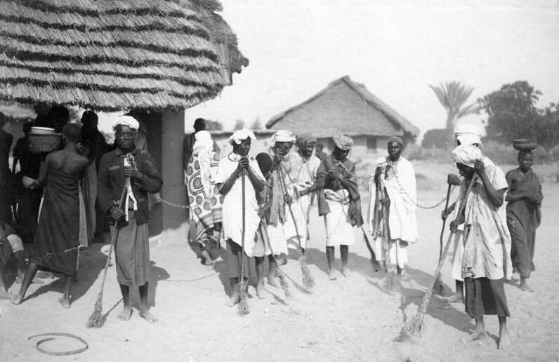 Exzellens Dernburg in Ostafrika Kettengefangene in Tabora